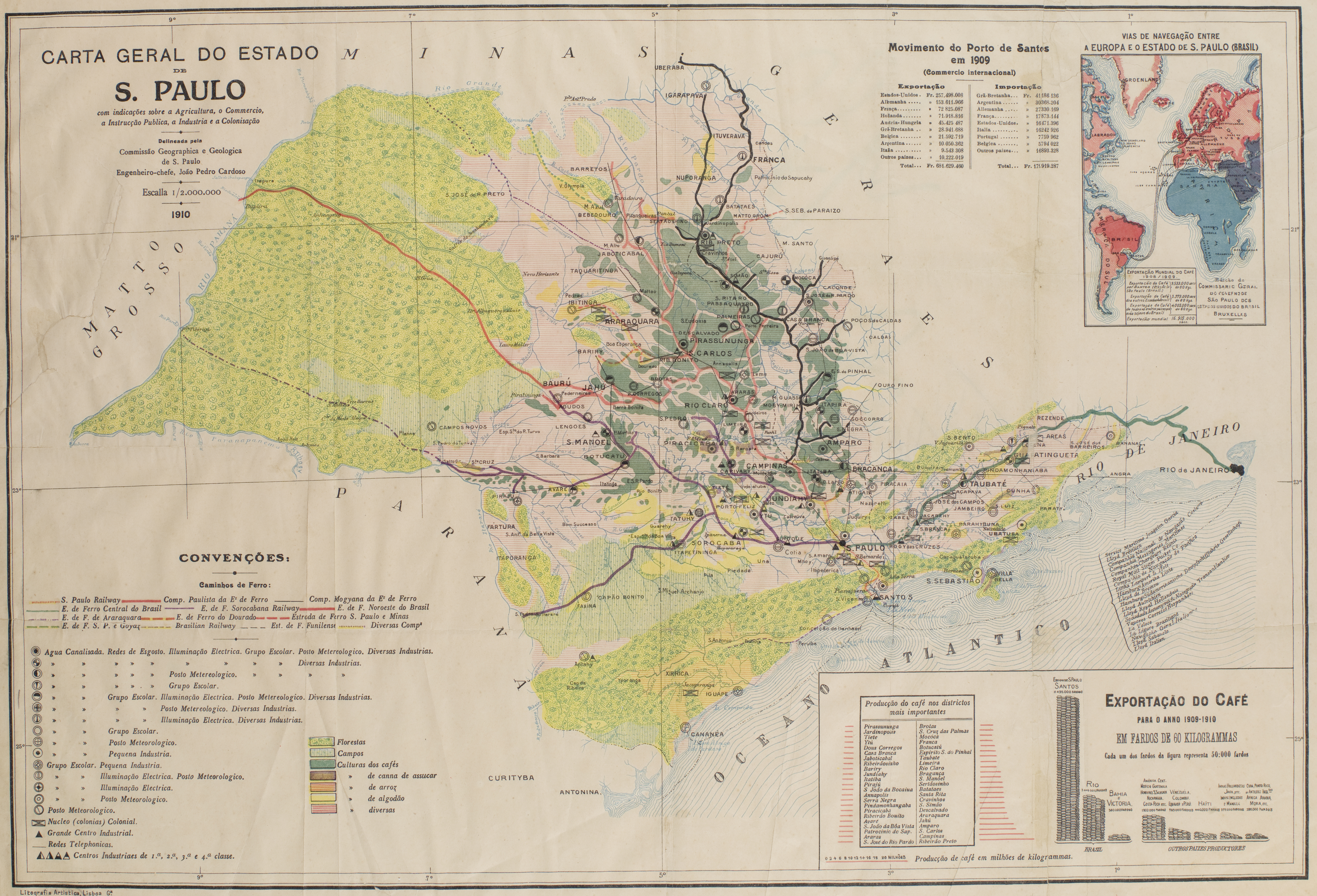 Obra que integra o acervo do Museu Paulista da USP. Coleção João Baptista de Campos Aguirra - Ref. Agente: Litografia Artistica, Lisboa G